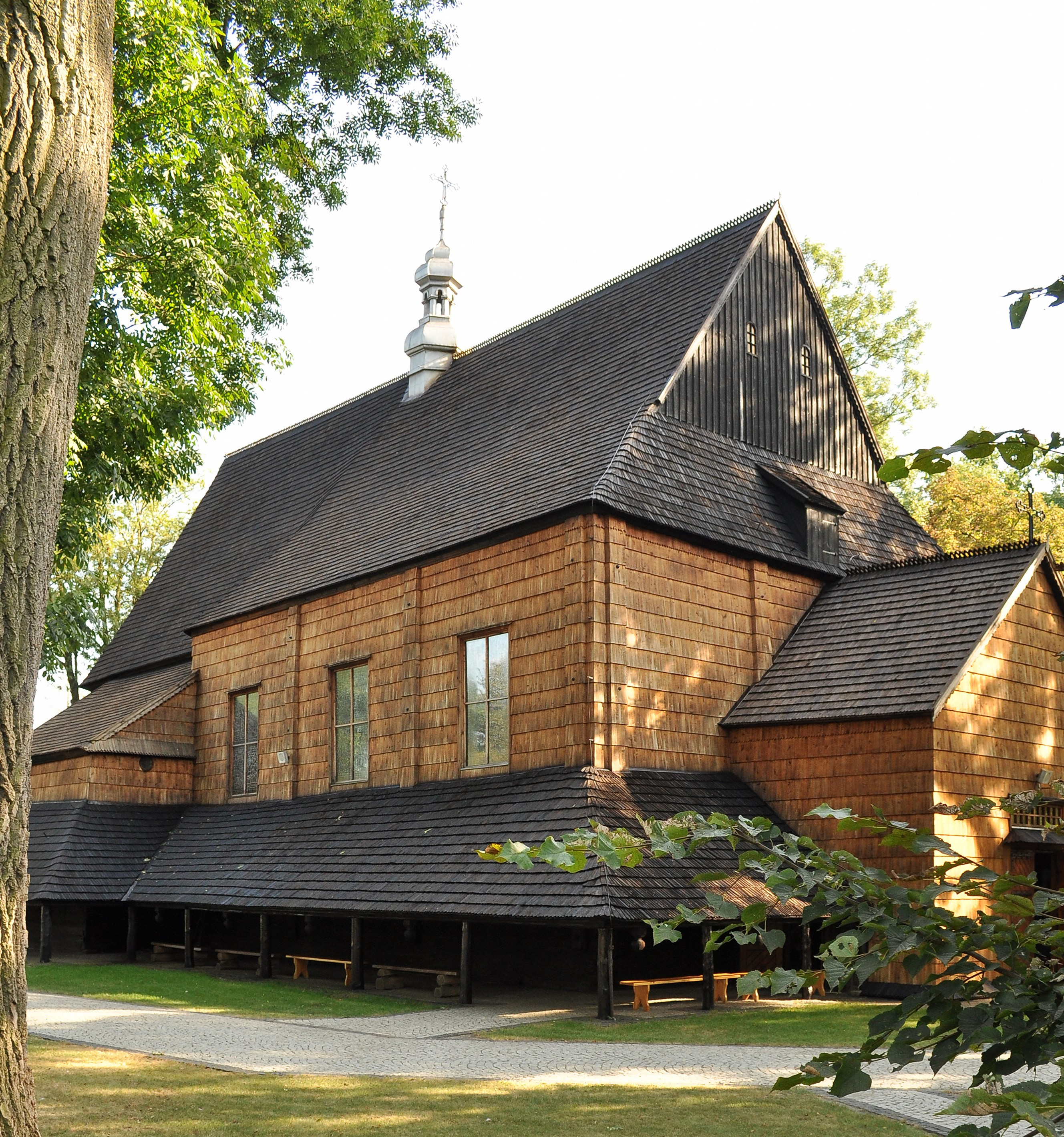 Kościół św. Wojciecha w Gawłuszowicach